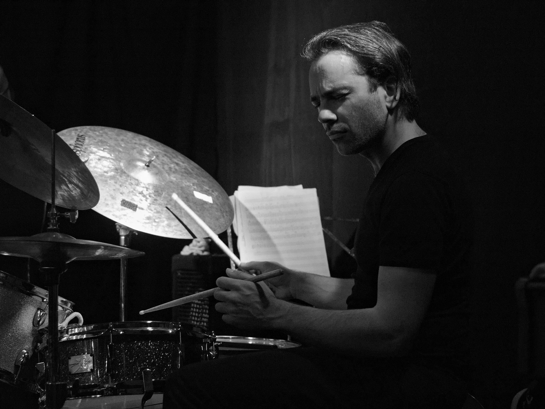 Le batteur Fabrice Moreau à l'occasion d'un concert donné aux Disquaires avec le projet ANTS